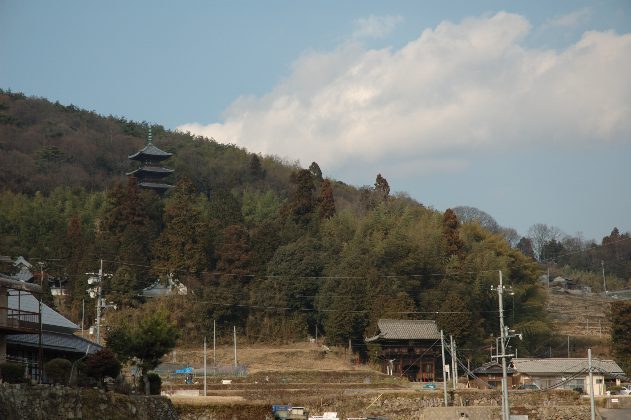 Kinzanji view